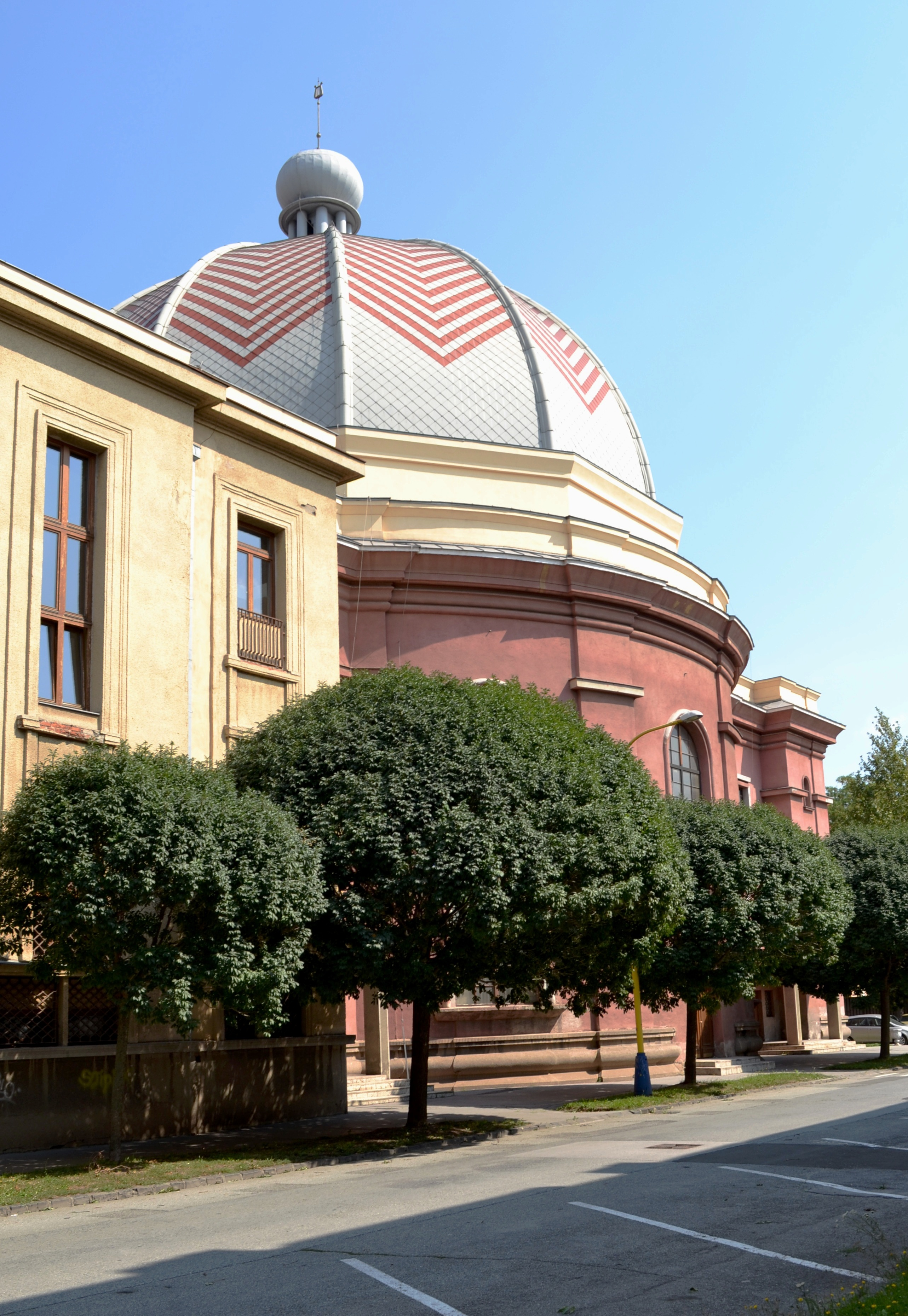 Košická neologická synagóga postavená v roku 1927